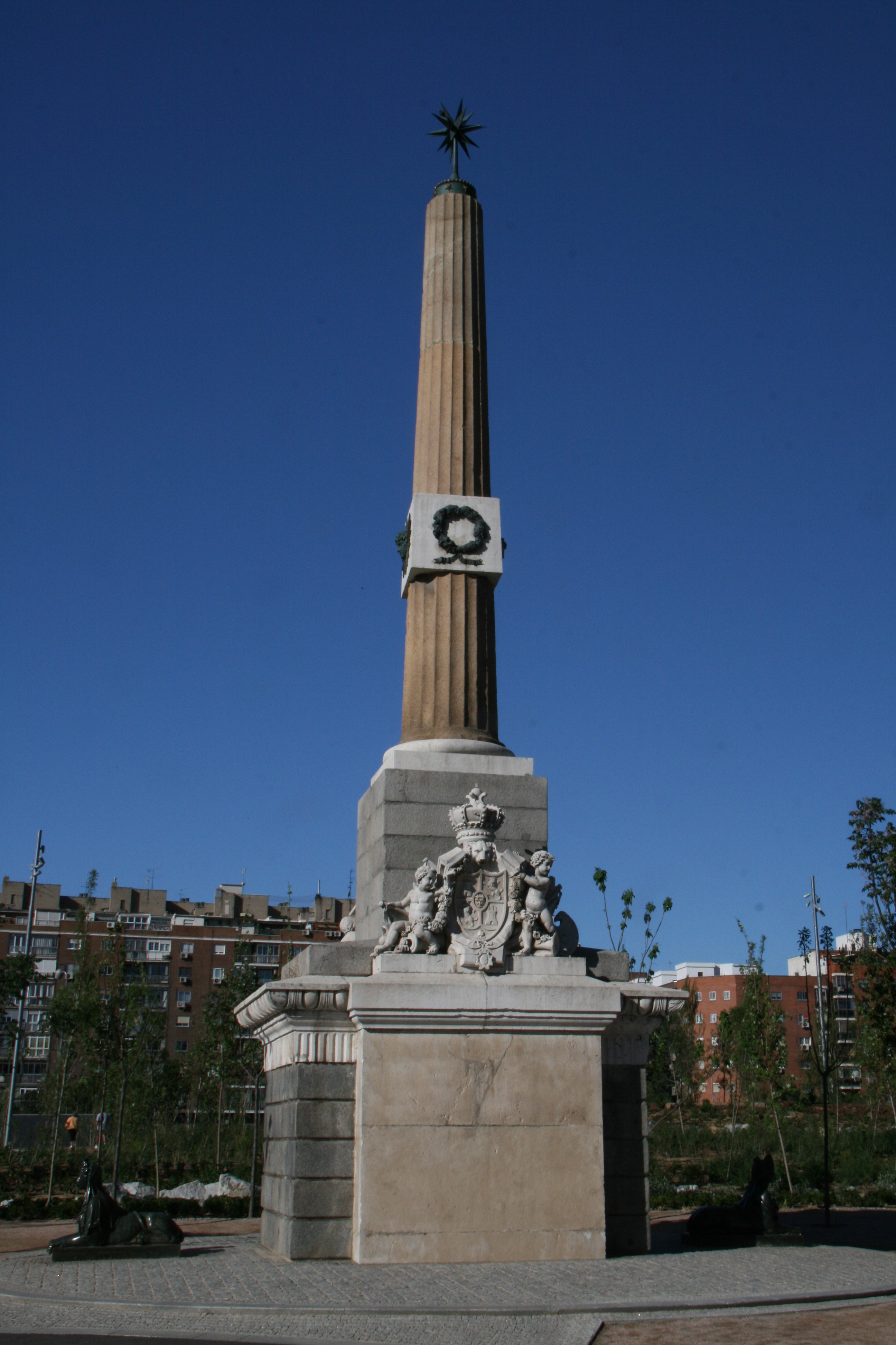 Obelisco de la Arganzuela - Denominado antiguamente como Obeisco de la Castellana